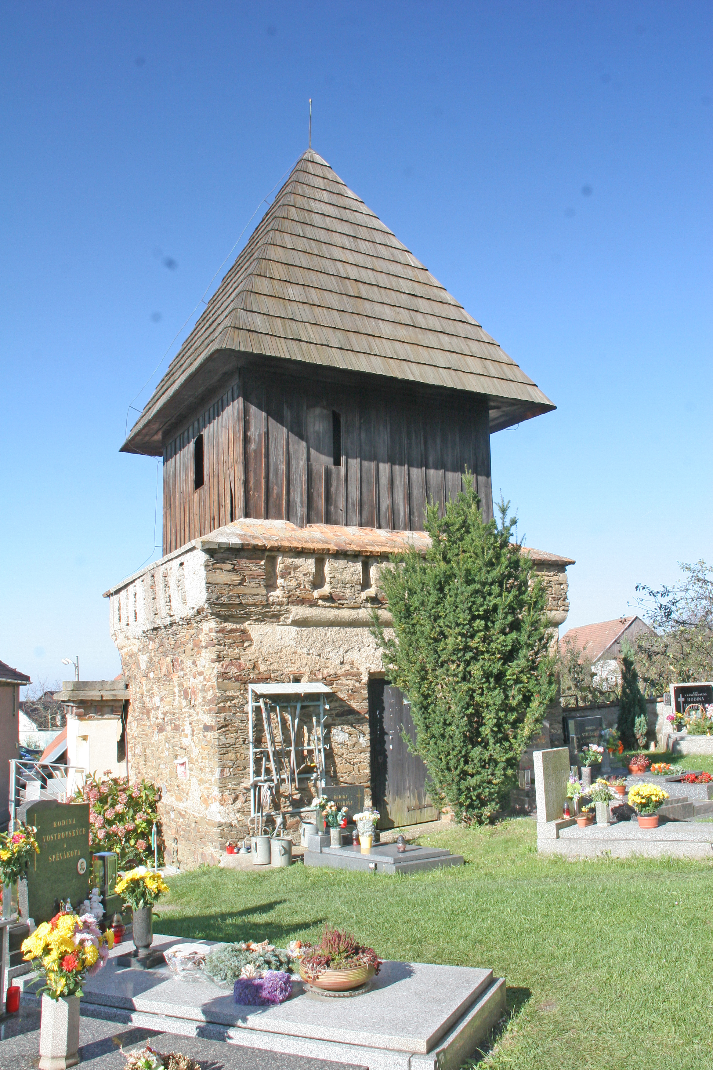 Kostel svaté Kateřiny, Licoměřice.